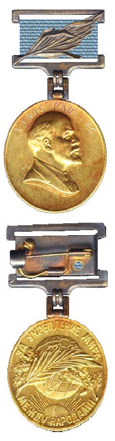 Voor- en keerzijde van de Leninvredesprijs van de Sovjet-Unie 1955 - 1991. In 1966 toegekend aan Linus Pauling